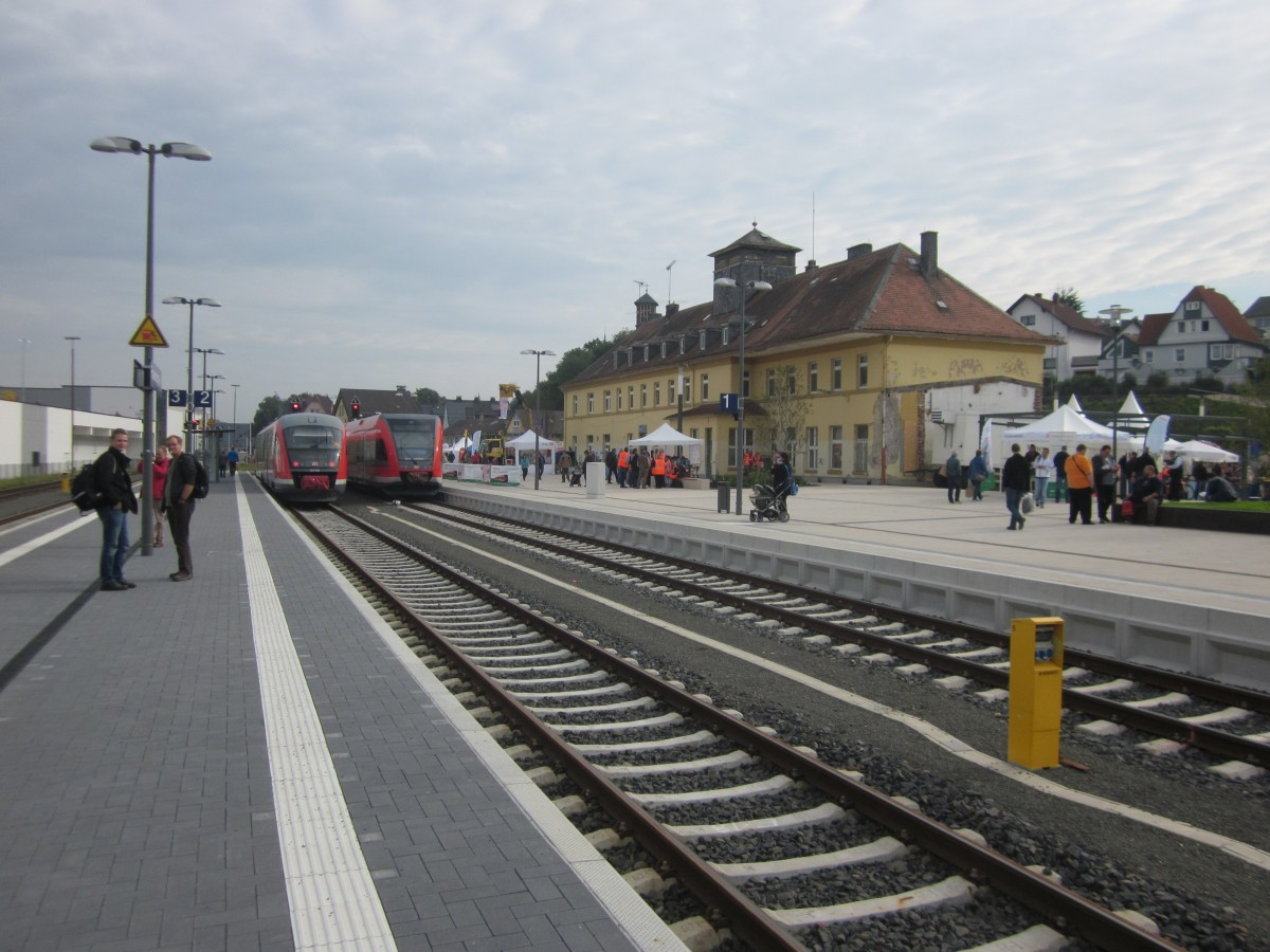 Gleisseite des Bahnhofes Frankenberg (Eder)